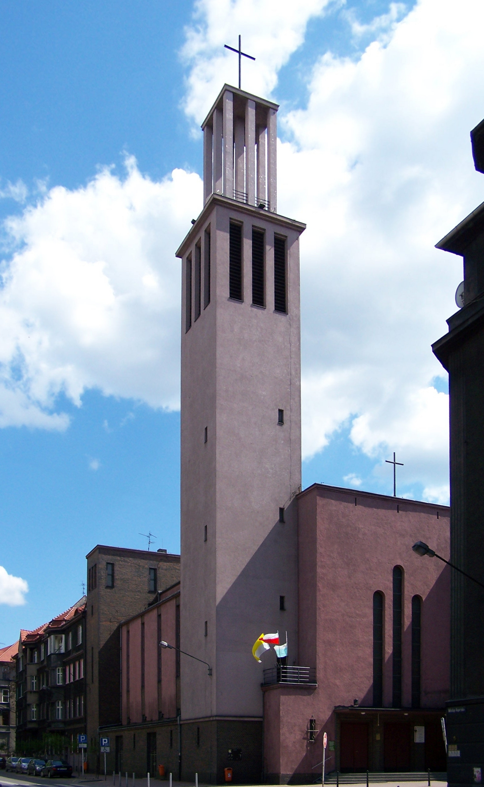 Kościół garnizonowy pw. Św. Kazimierza w Katowicach. Wybudowany w latach 1930-31 wg. projektu Leona Dietza d'Arma. (zabytek nr rejestr. A/1378/88)